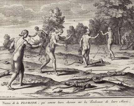 Indianerinnen aus Florida streuen ihre abgeschnittenen Haare auf die Gebeine ihrer toten Ehemänner, Illustration aus Cérémonies et coûtumes religieuses de tous les peuples représésentés par des figures dessinées par Bernard Picart, Jean Frédéric Bernard 1723-1743, Amsterdam.